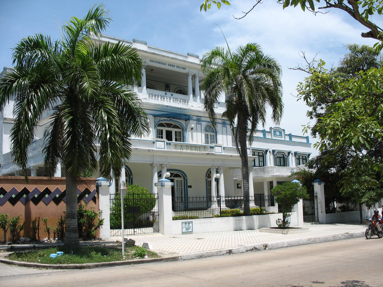 La Perla